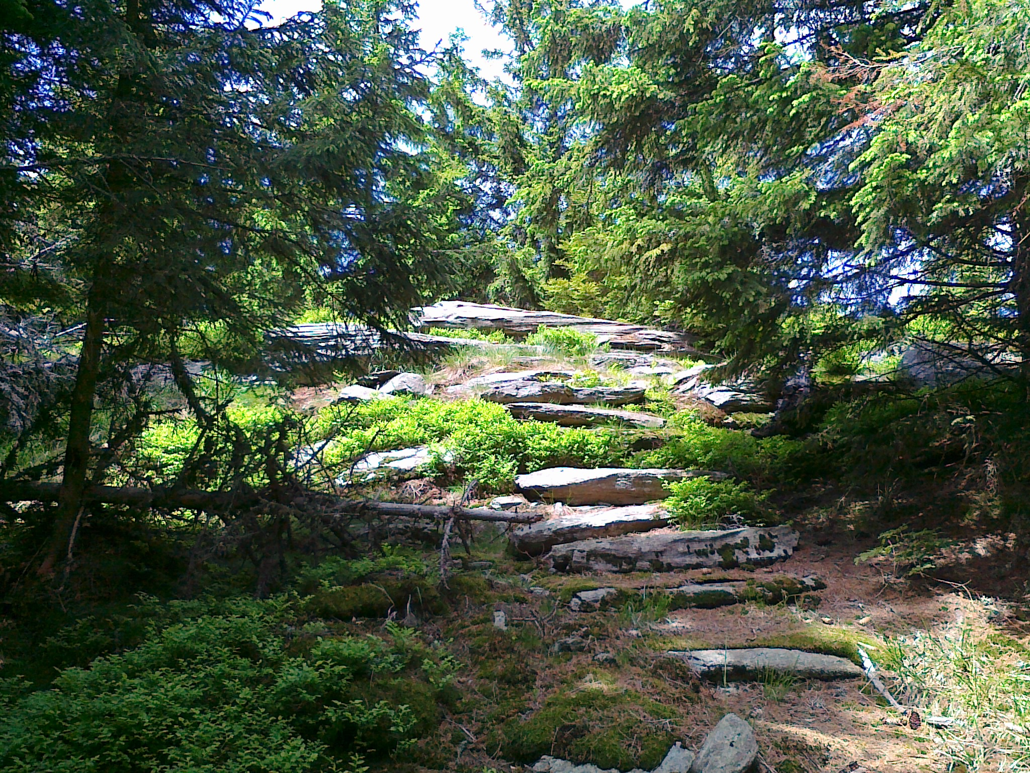 Widok na grupę skalną góry Malý Máj (1080 m n.p.m.)